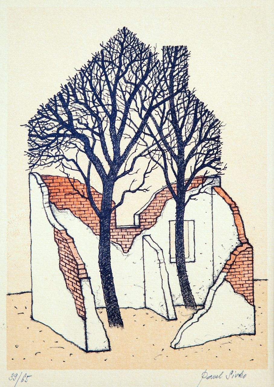 Pavel Sivko, Dům, barevná litografie